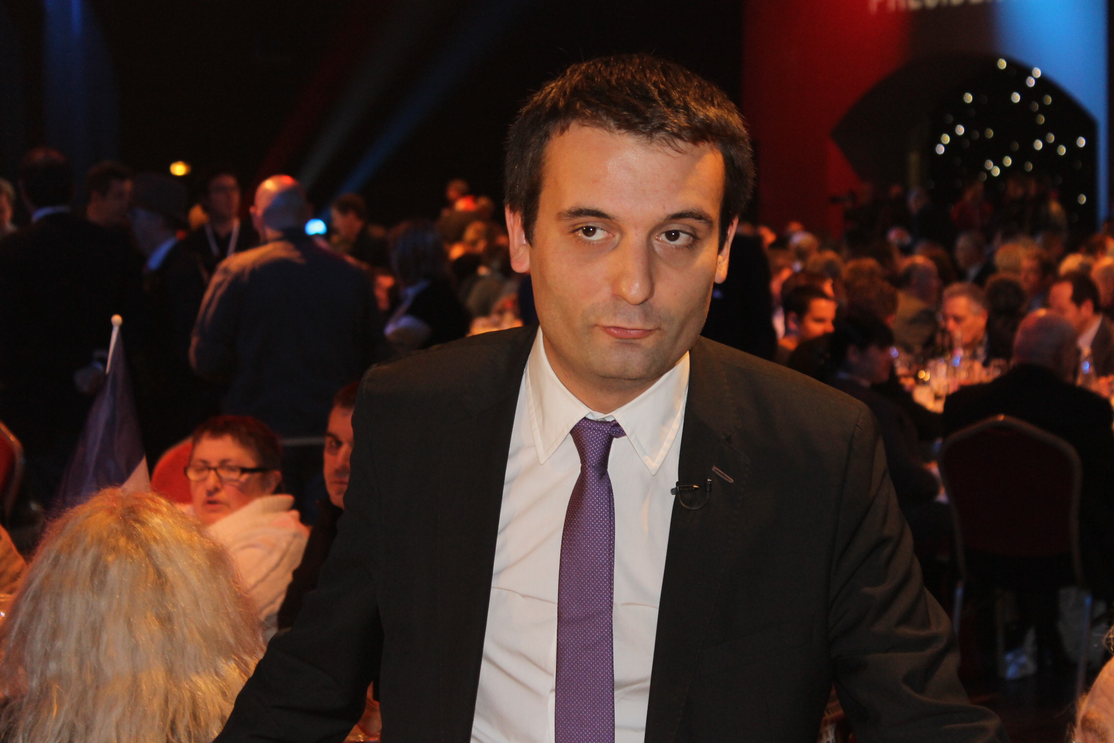 Photo de Florian Philippot, porte-parole de Marine Le Pen, lors de la présentation du projet présidentiel de la candidate, le 19 novembre 2011 à Paris. Photo © 2011 G. Bouchet/Front national